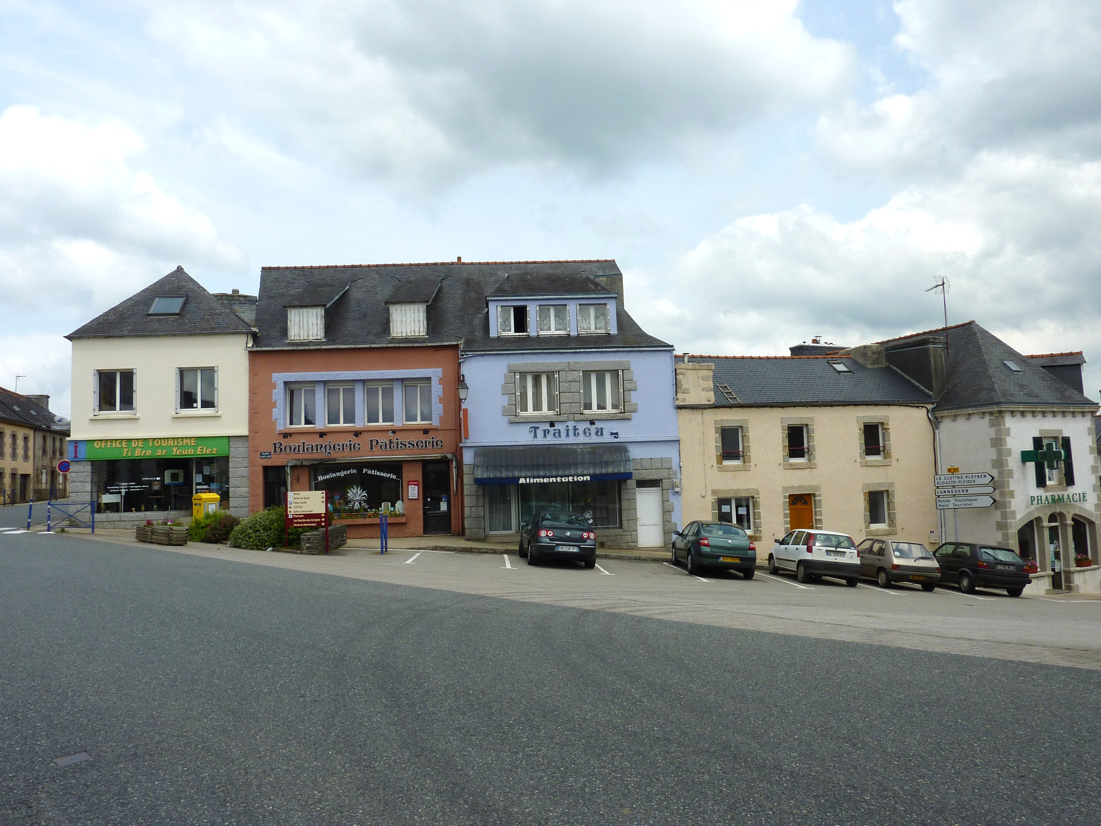 Brasparts Autre Place